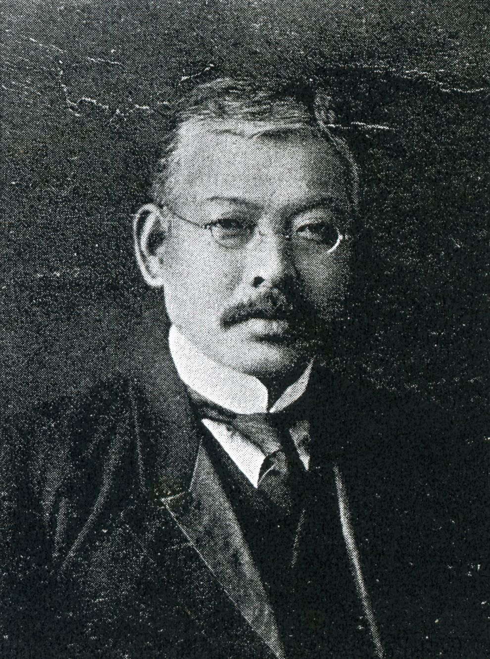 この写真は、小山松寿（1876-1959）の写真です。